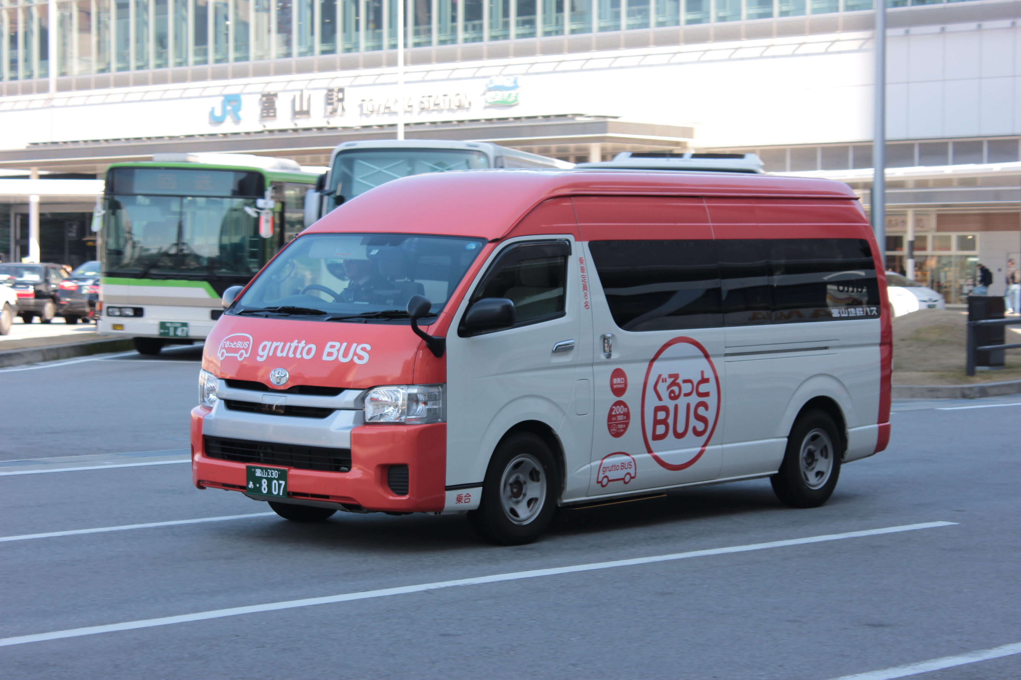 富山地方鉄道のぐるっとBUS（トヨタ・ハイエース、富山駅にて） Canon EOS Kiss X5